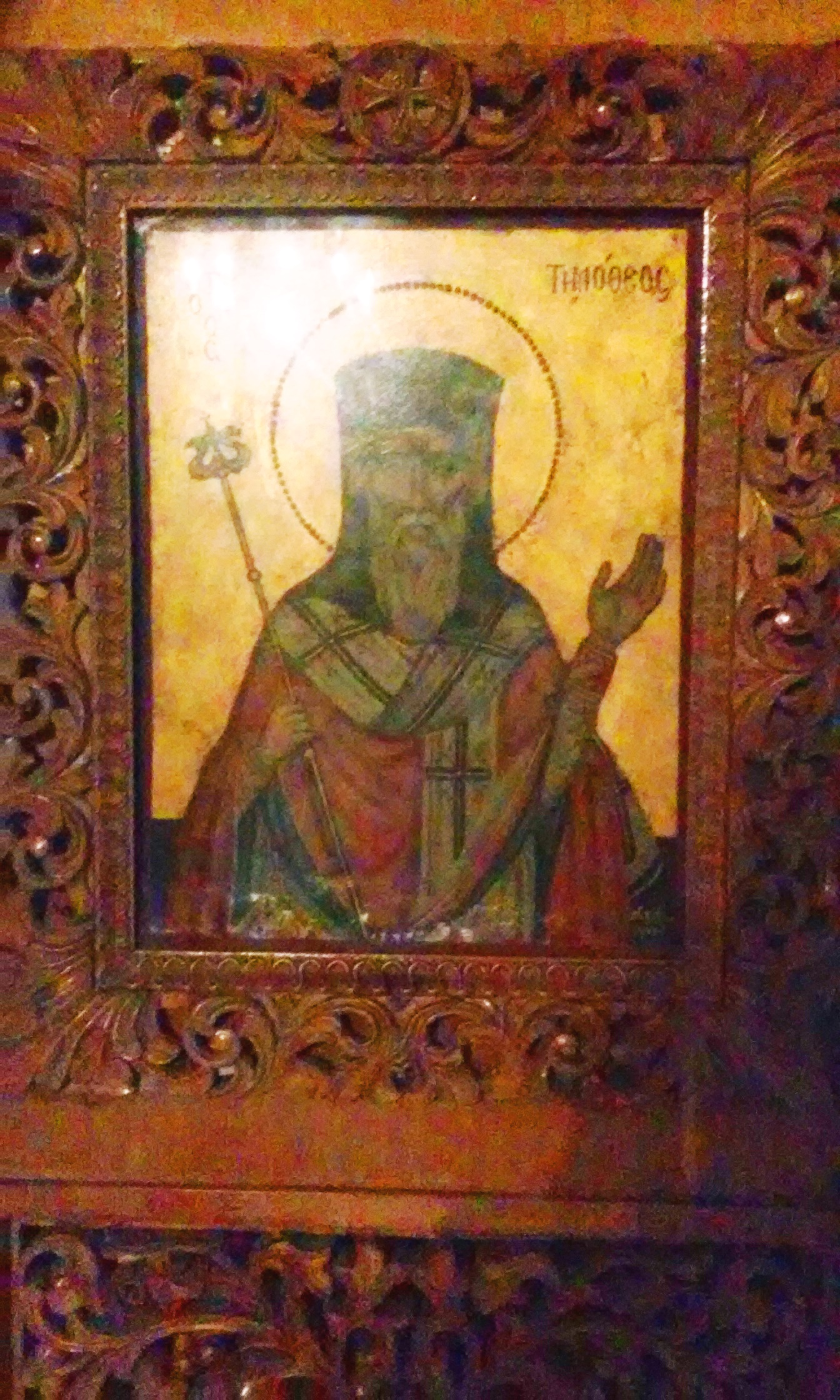 Ο Αγιος Τιμοθεος Επισκοπος Ευριπου-εικονα απο την Ιερα Μονη Πεντελης